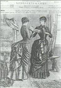 Página de A Estação, antigo jornal carioca.